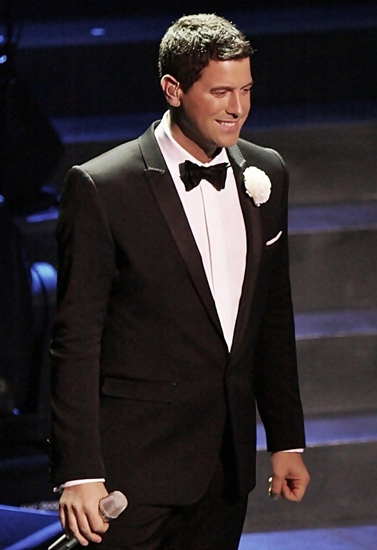 Sebastien Izambard - Il Divo Orchestra in Concert At Sydney Opera House